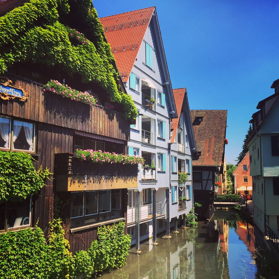 Fischer- und Gerberviertel in Ulm